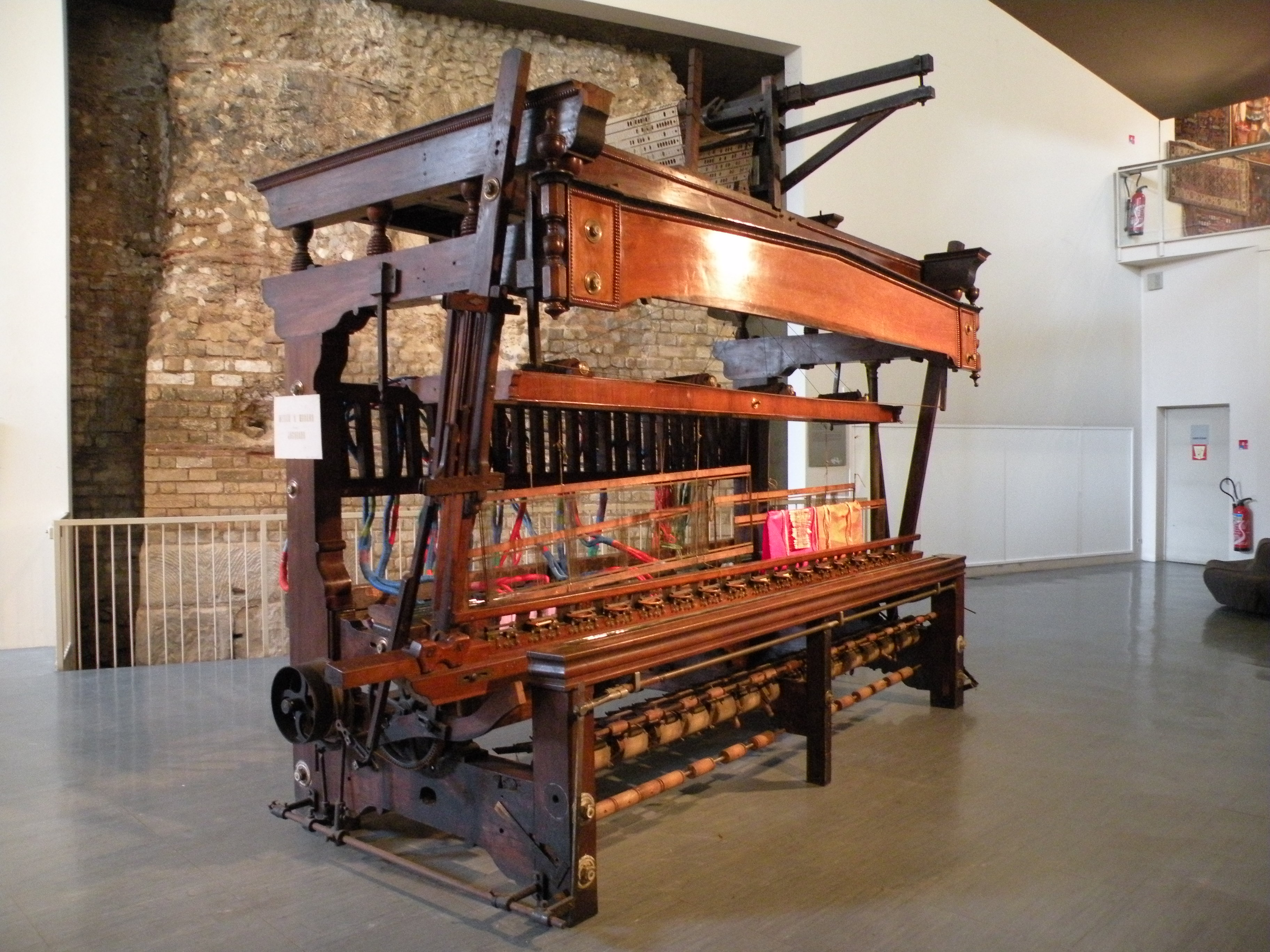 metier a tisser Musée de la tapisserie de Beauvais